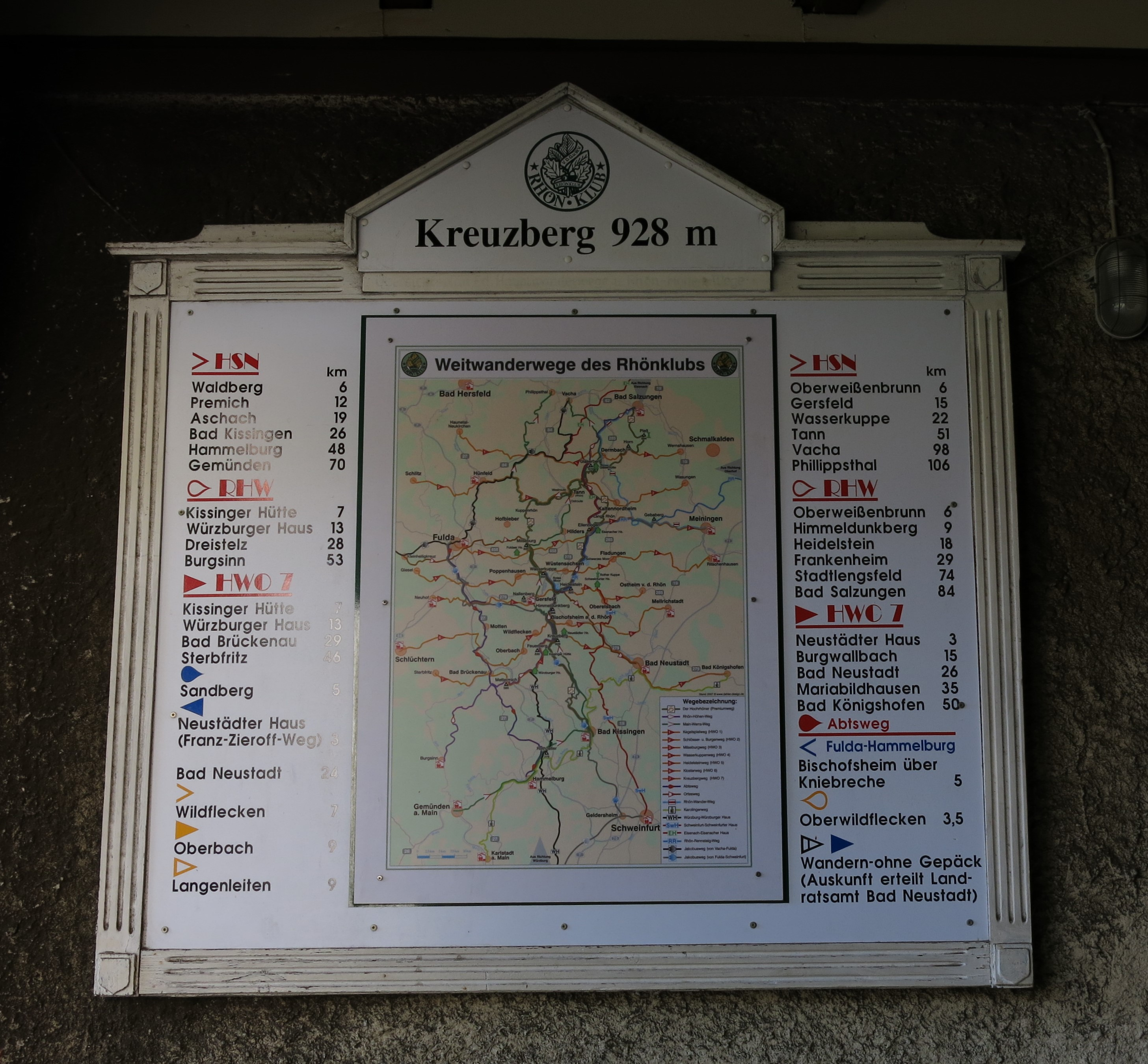 Kloster Kreuzberg - Info-Tafel über Wanderwege